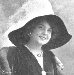 Fotografía de la cantante española Conchita Supervía publicada en 1913 con motivo de su actuación en el Liceo de Barcelona